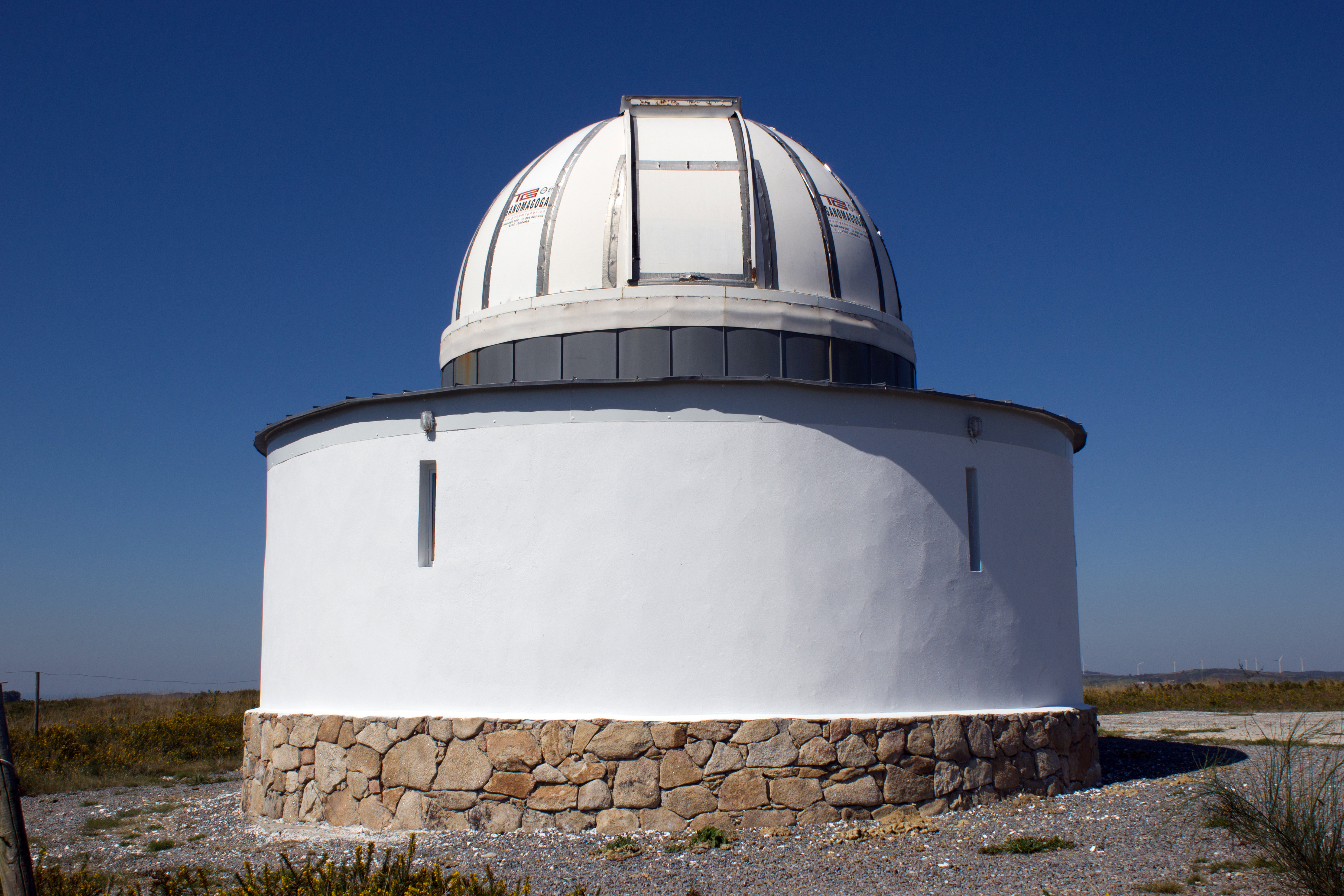 Observatorio astronómico de Forcarei